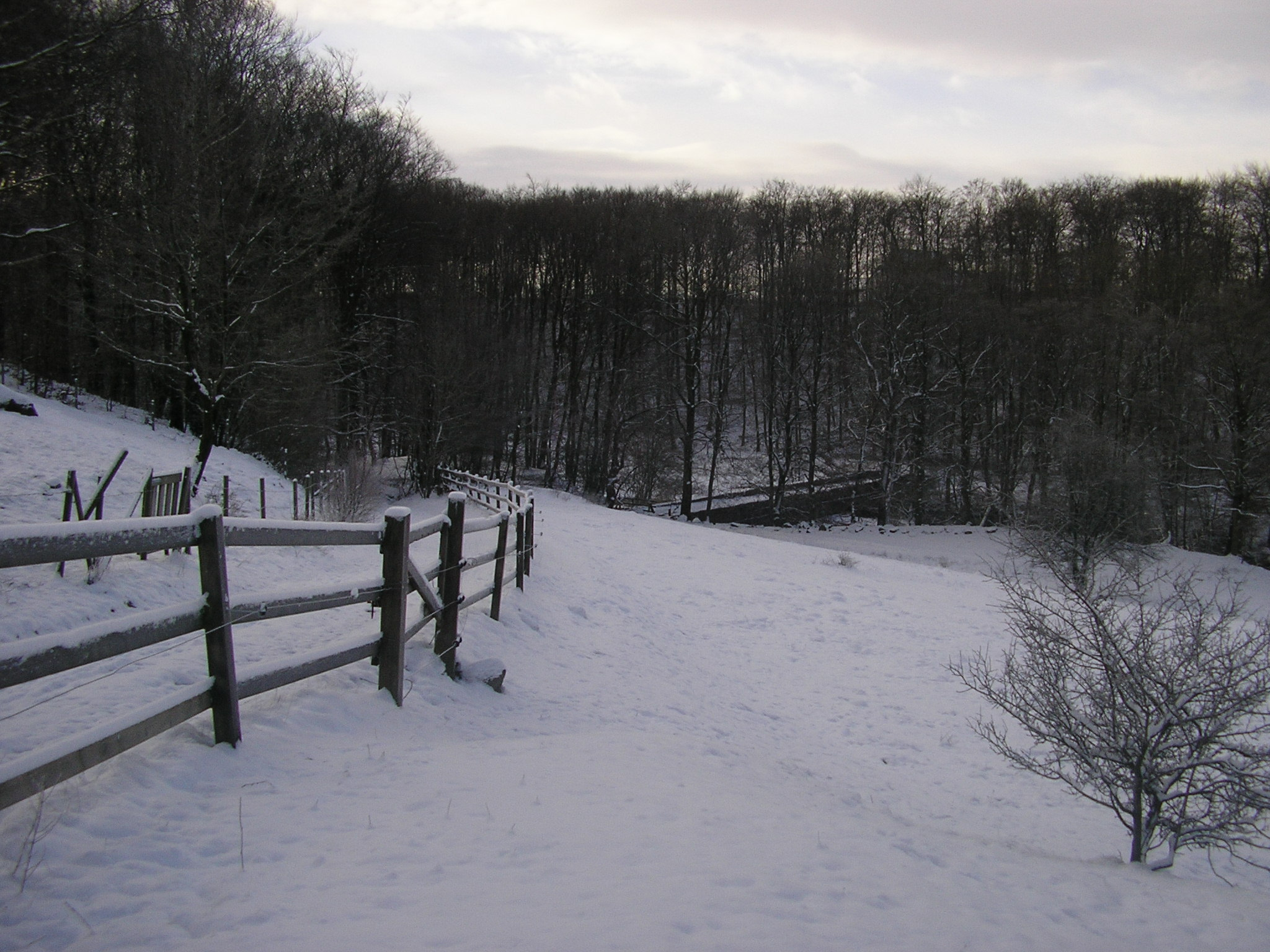 Bild över en äng som ligger i rövarekulan. Längre bort i bild syns rövarekulans valvbro.